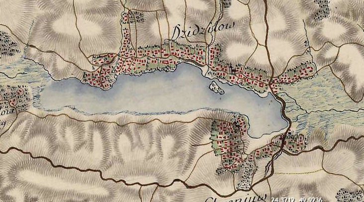 Дідилів 18ст.